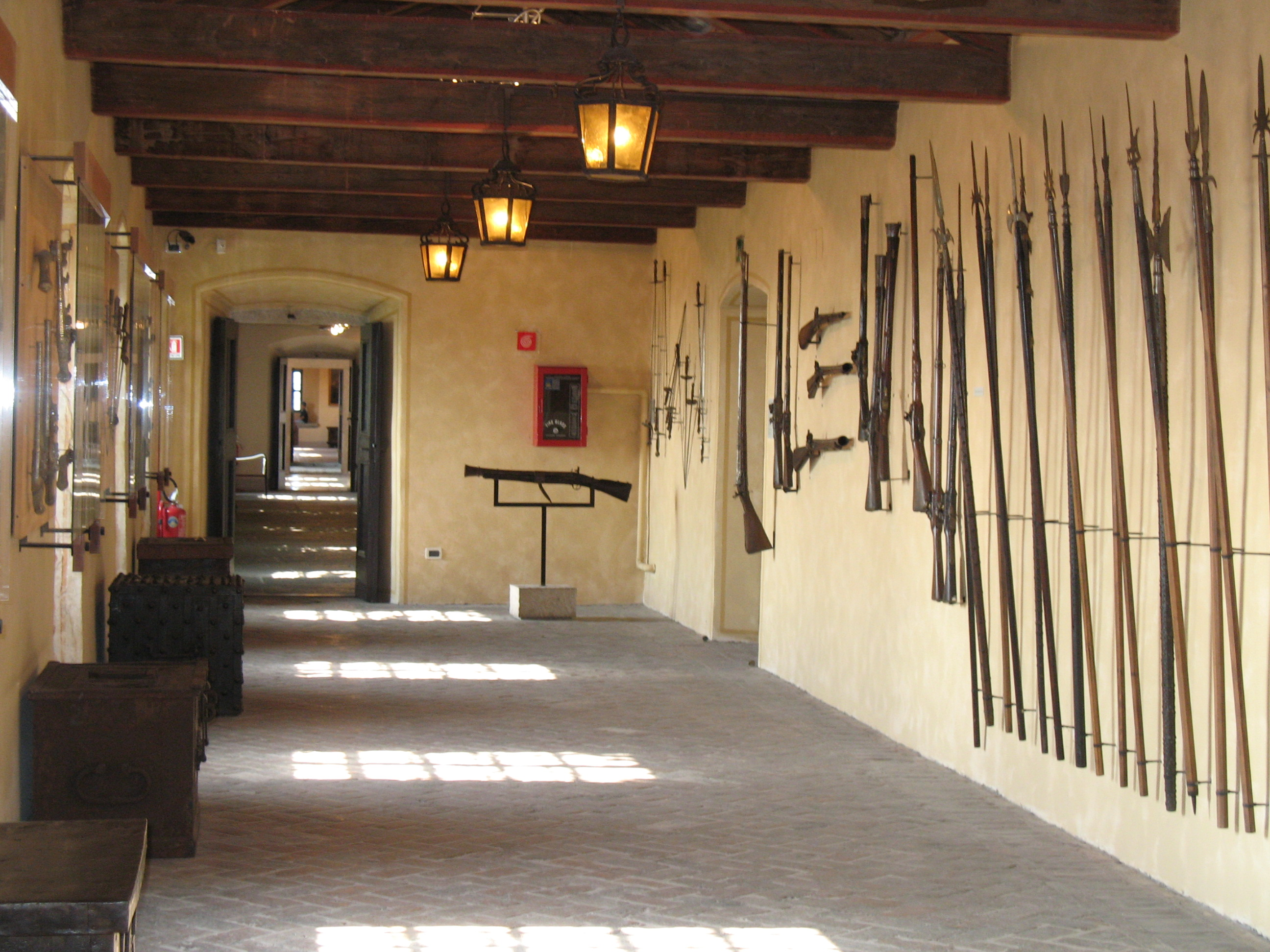 Immagine da Trieste - Castello di San Giusto.